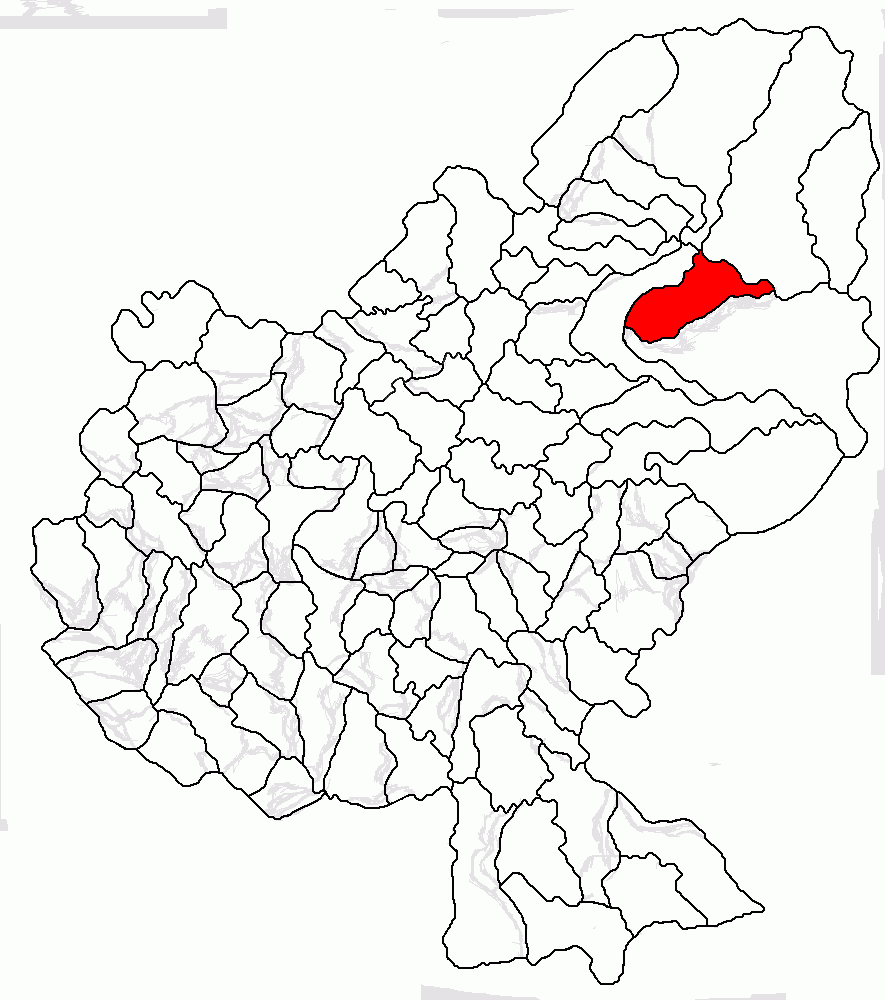 Categorie:Hărţi ale judeţului Mureş